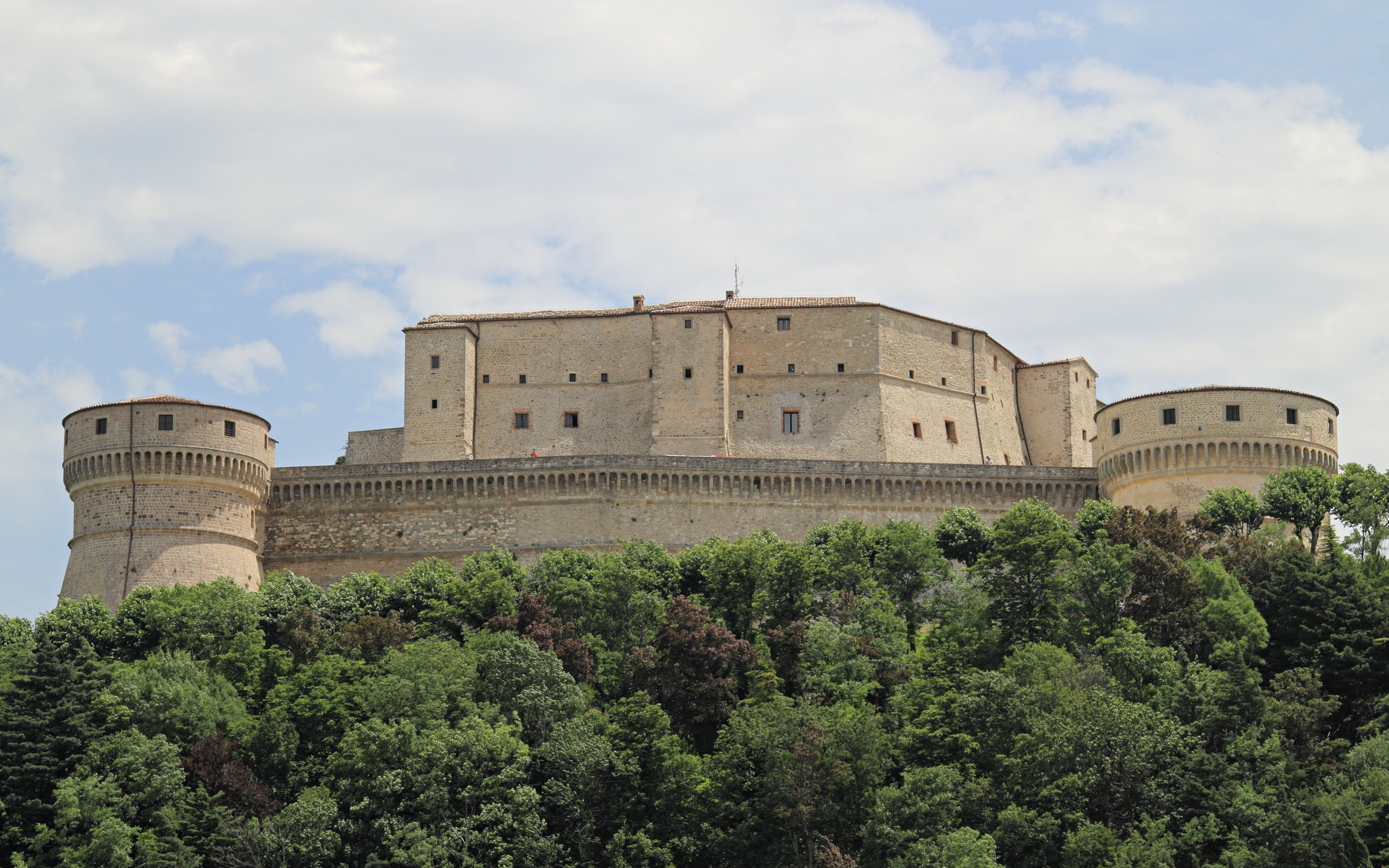 San Leo - Festung